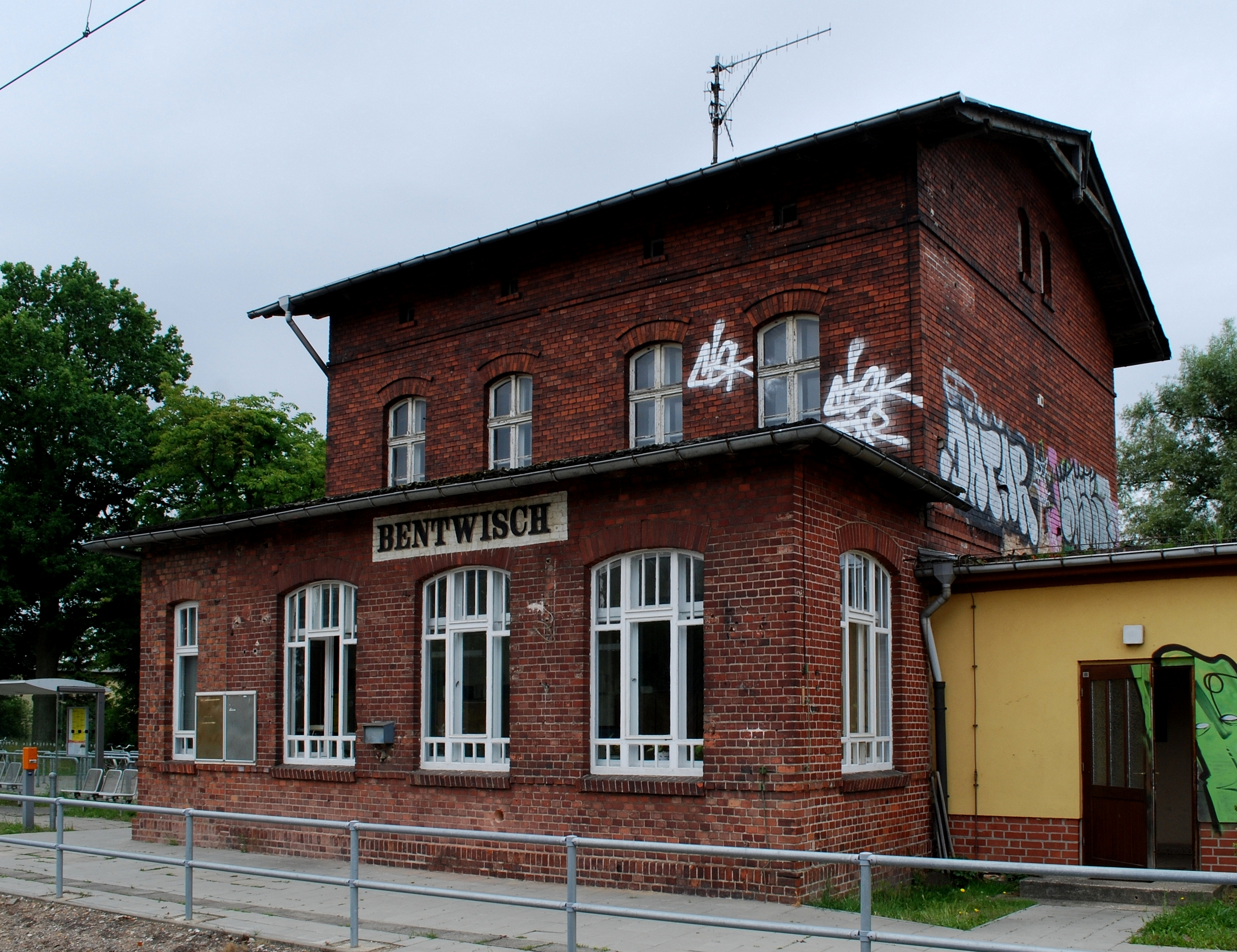 Der Bahnhof in Bentwisch. Befahren von der Linie nach Graal Müritz und Gegenrichtung Rostock Hbf/ Bad Doberan.